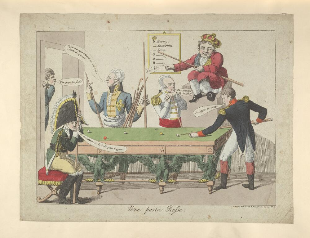 French political cartoon